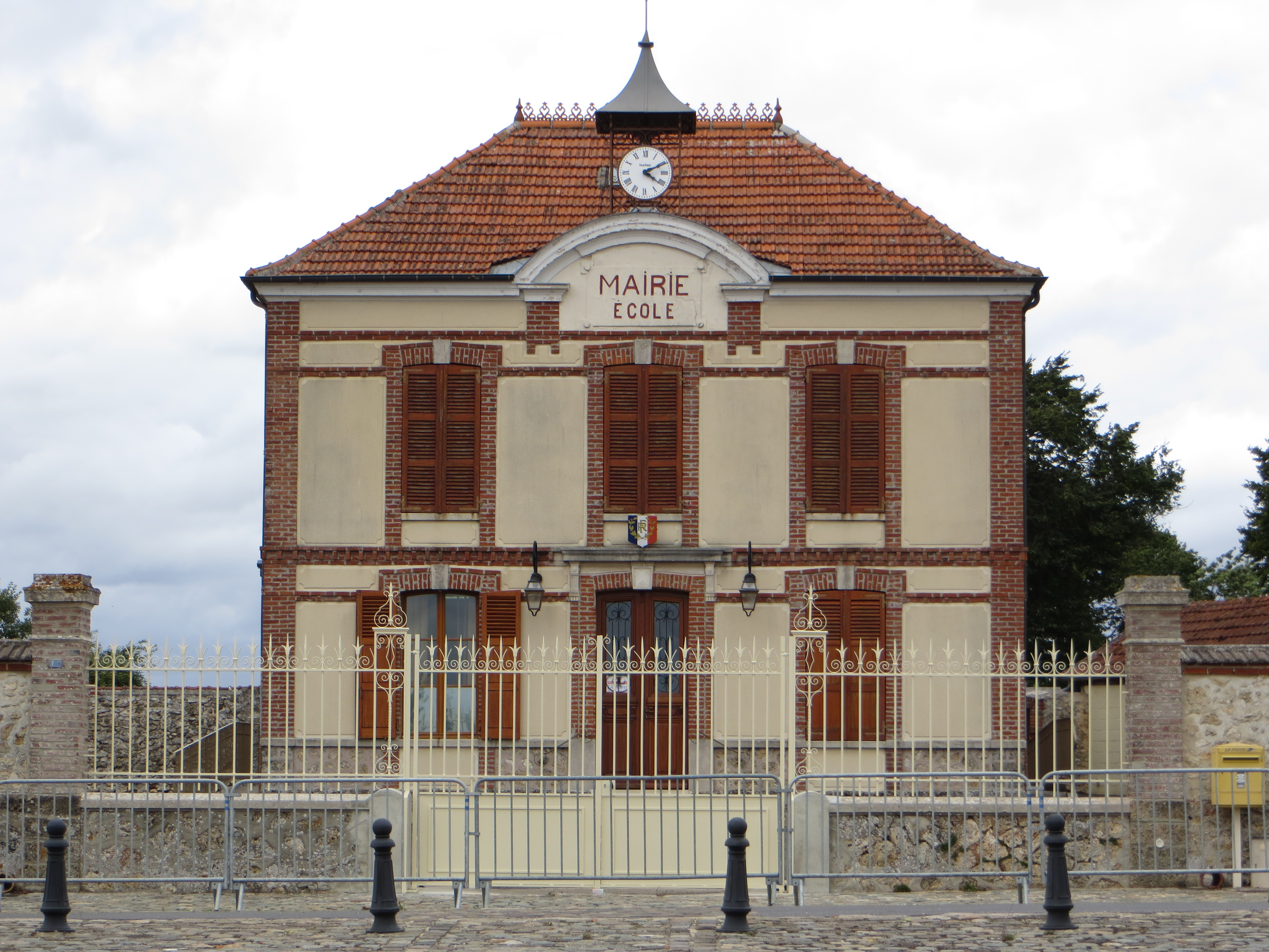 Mairie